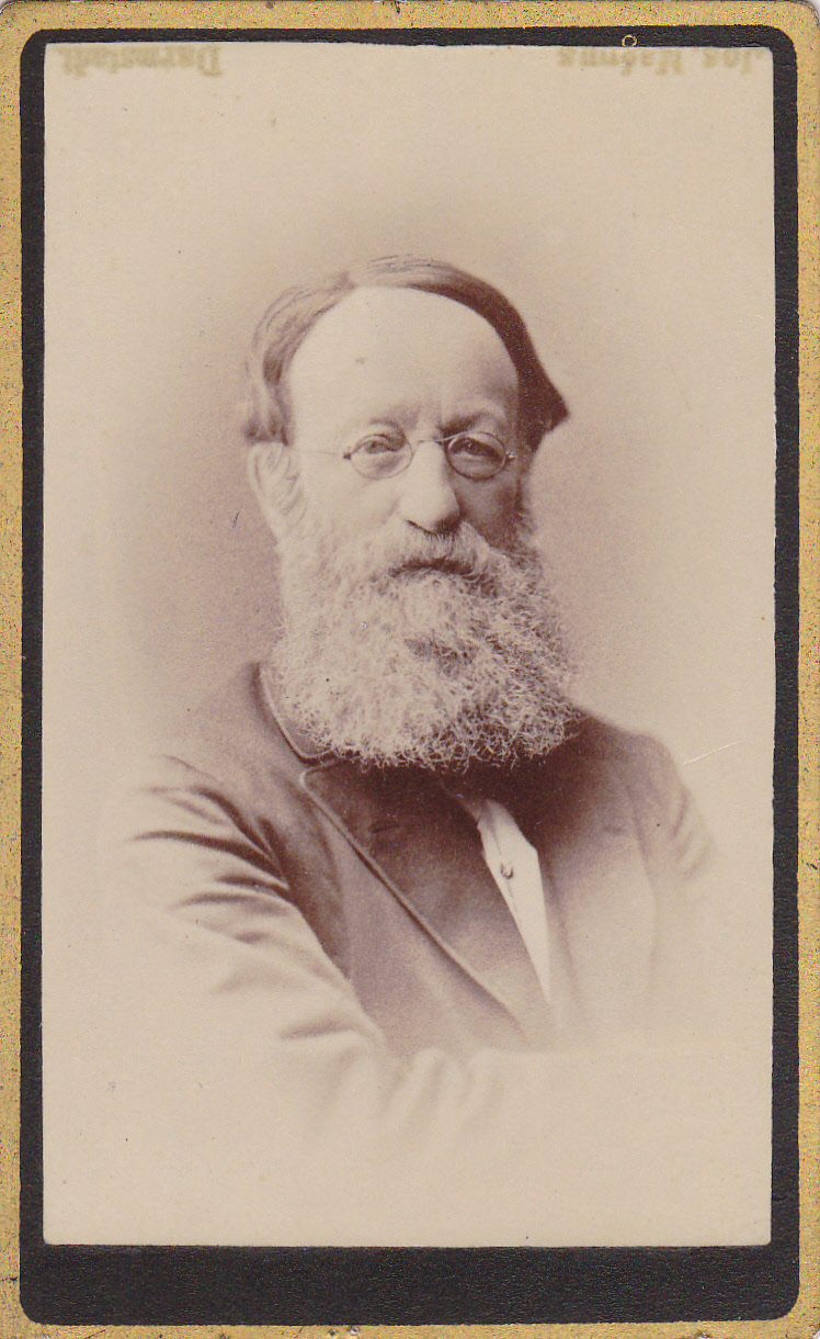 Portrait C.A. Mangold mit Bart, Darmstadt